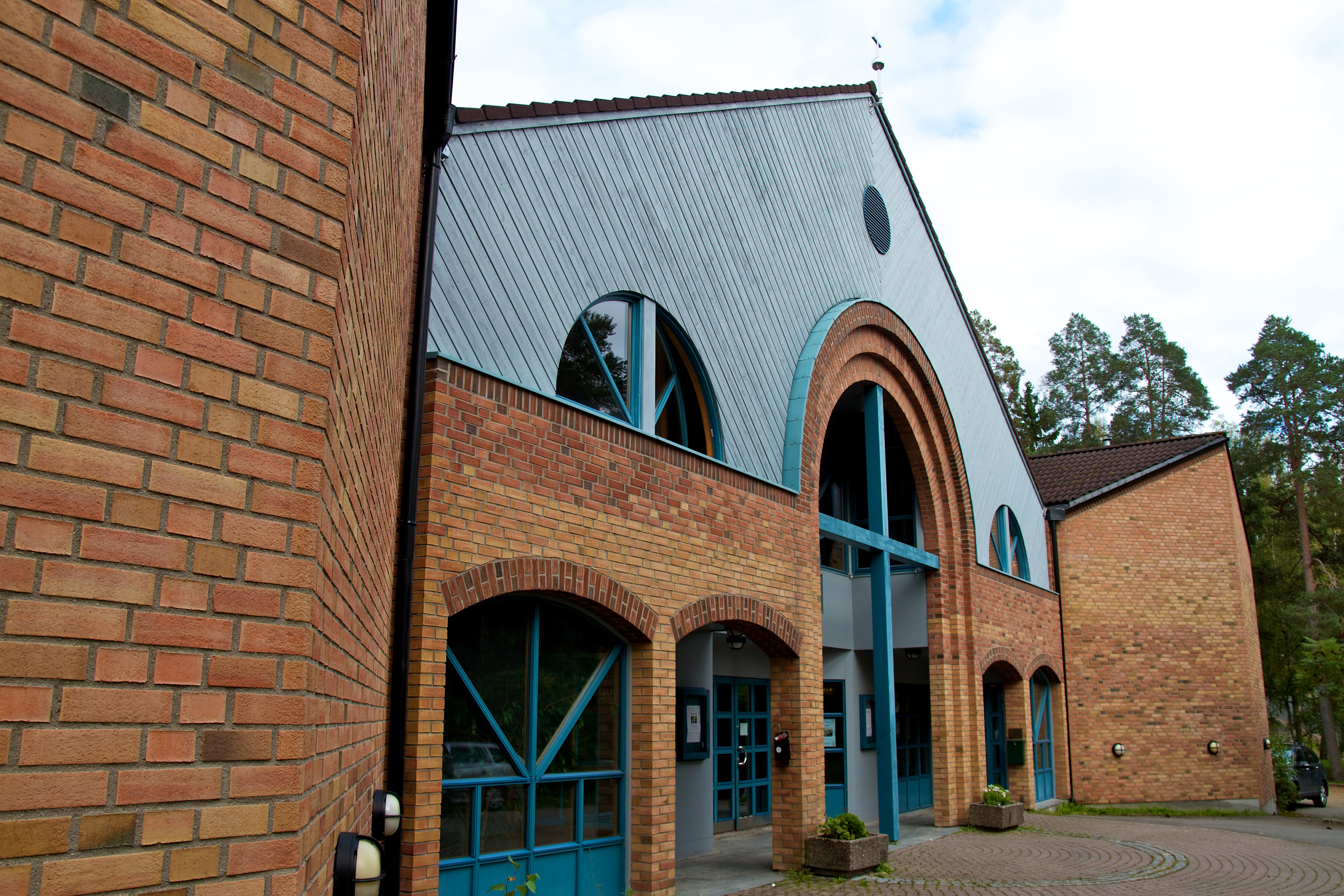 Hauketo-Prinsdal kirke